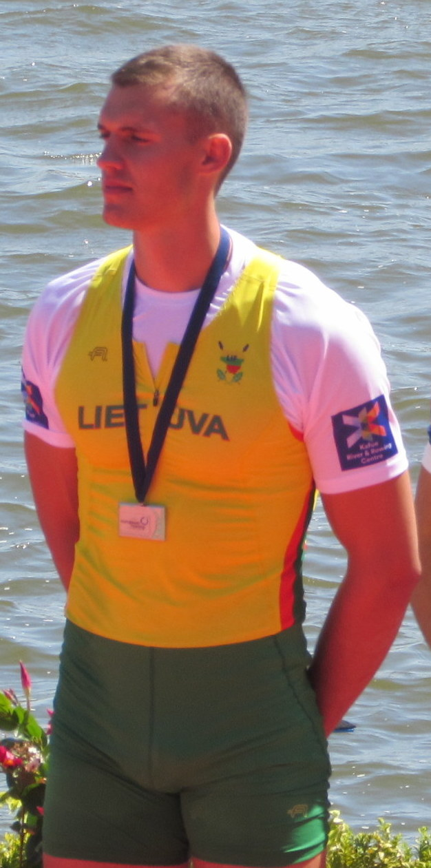 Dovydas Nemeravičius, Martynas Džiaugys, Dominykas Jančionis, Aurimas Adomavicius, Ruder-EM 2016